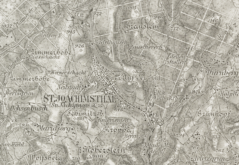 Ausschnitt aus: Kaaden und St. Joachimsthal.; Spezialkarte der osterreichisch-ungarischen Monarchie. Bergstadt St. Joachimsthal und Umgebung.